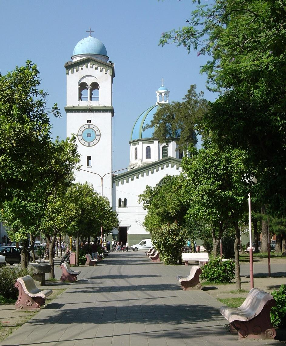 Nuestra Señora del Rosario Church, Monteros, Tucumán